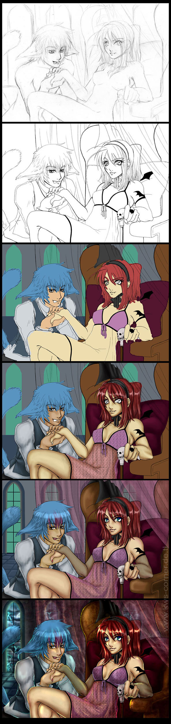 2. Platz des Wikipedia-Wettbewerbs bei Animexx in der Kategorie Zeichentechnik.